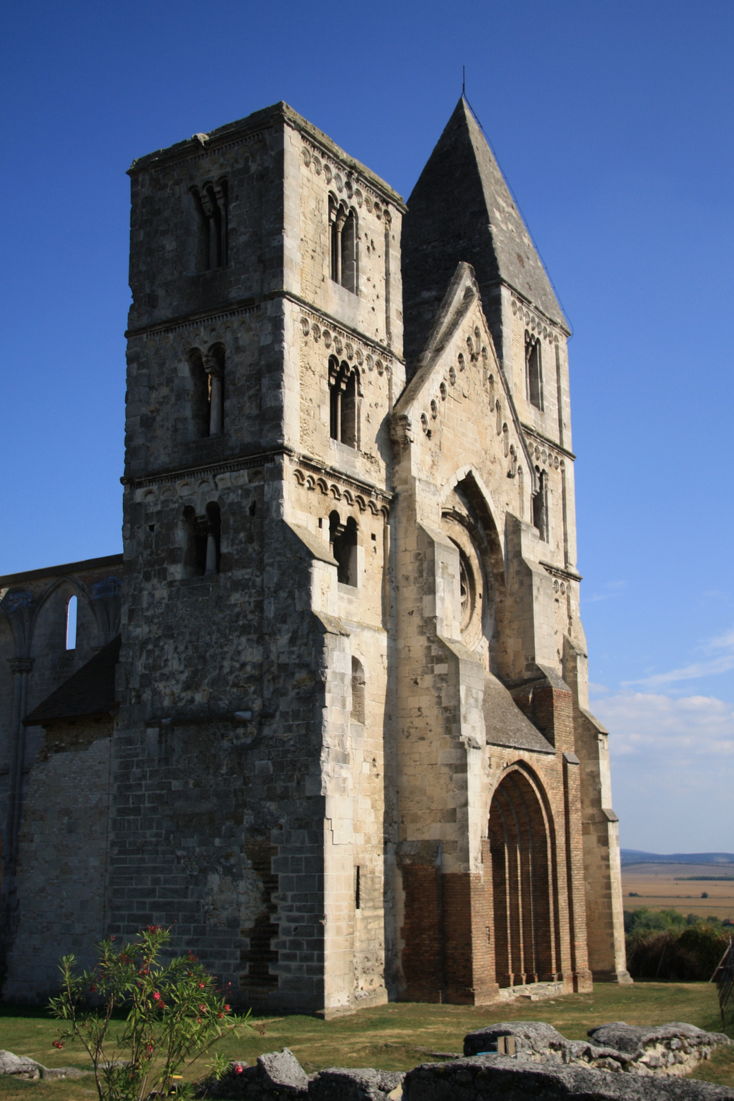 Premontrei prépostsági templom romja (Zsámbék, Régi templom u.) This is a photo of a monument in Hungary. Identifier: 7623